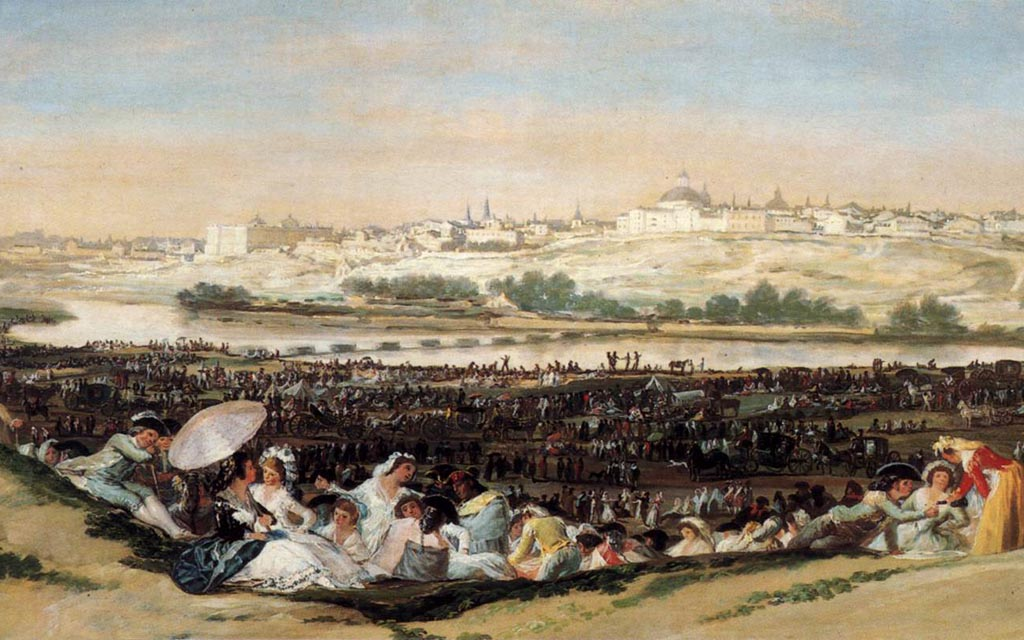 La pradera de San Isidrotitle QS:P1476,es:"La pradera de San Isidro" label QS:Les,"La pradera de San Isidro"